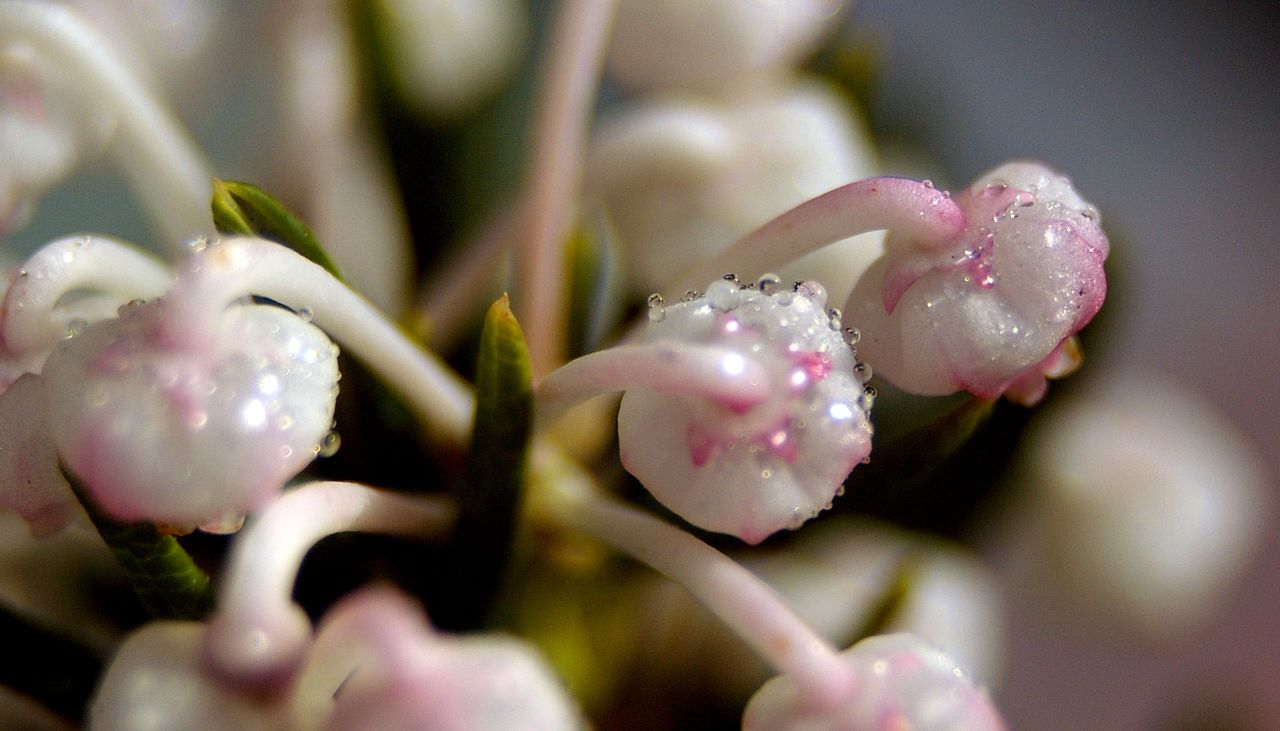 Andromeda polifolia